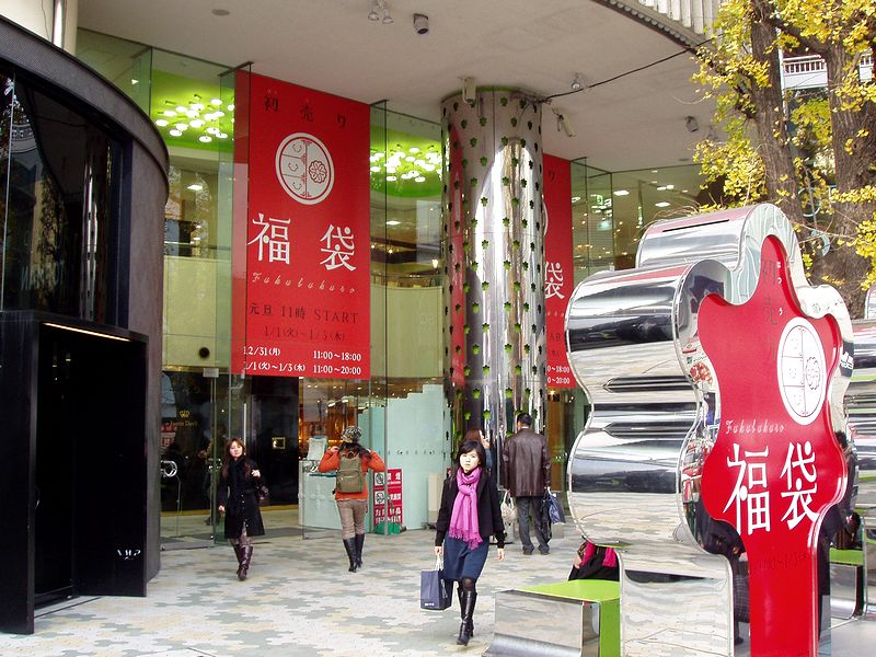 ラフォーレ原宿